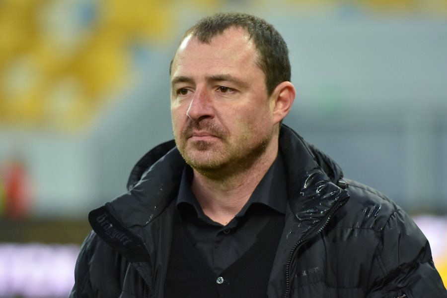 Роман Монарёв - украинский футболист и тренер